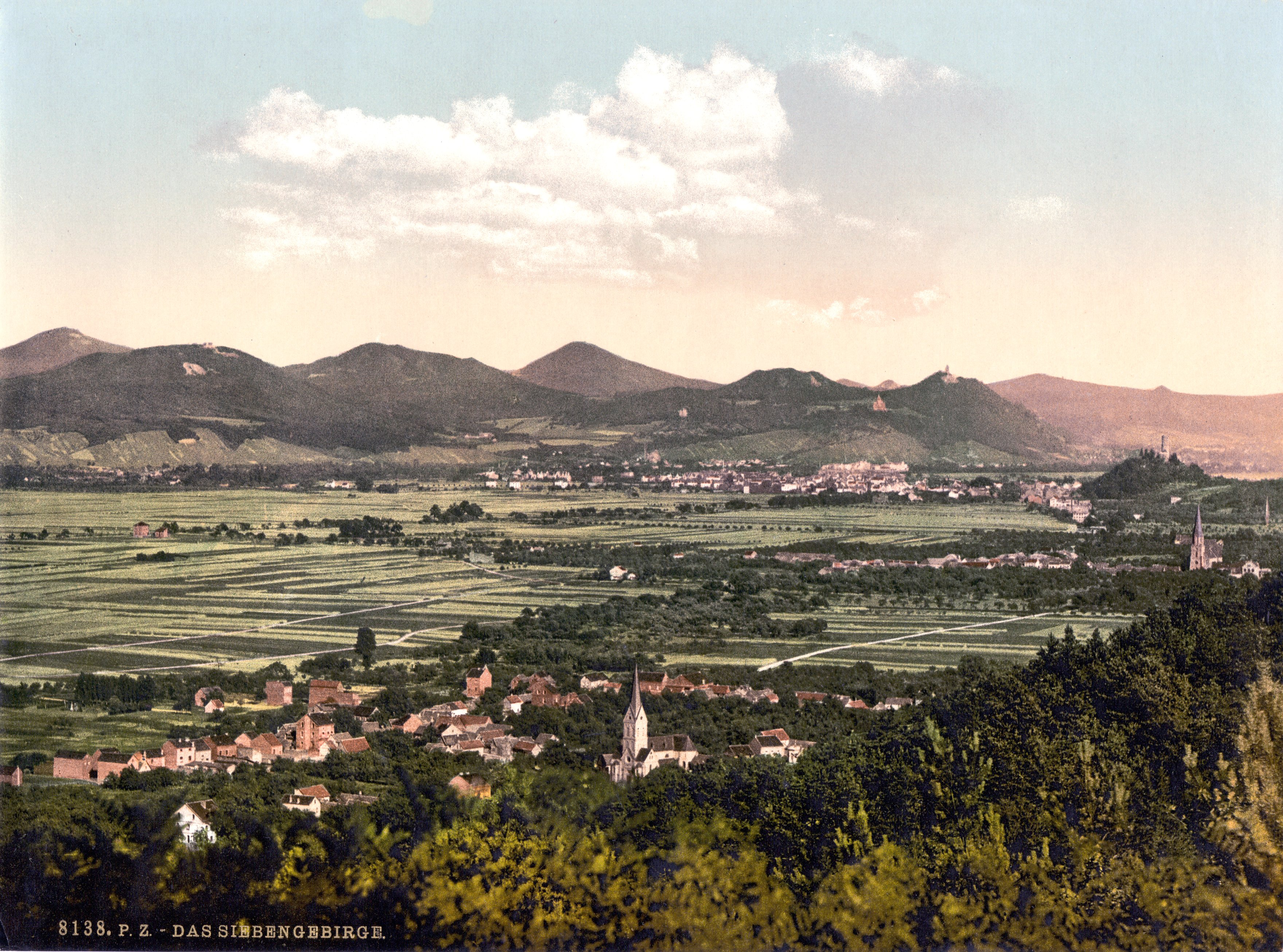 Siebengebirge um 1900